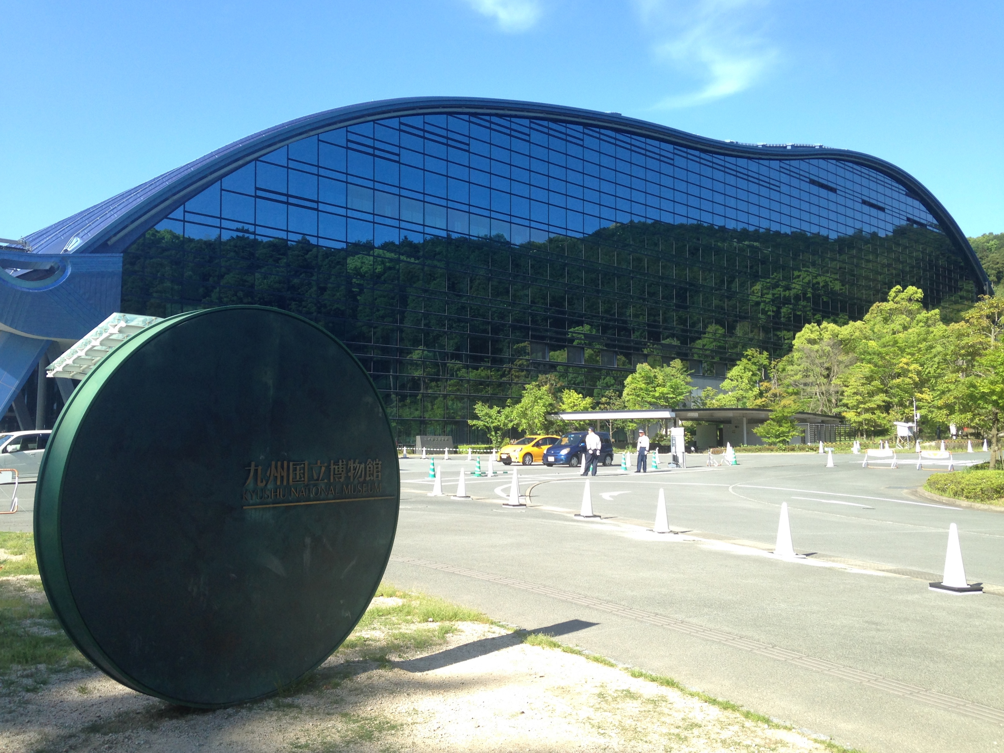 南側から望む九州国立博物館